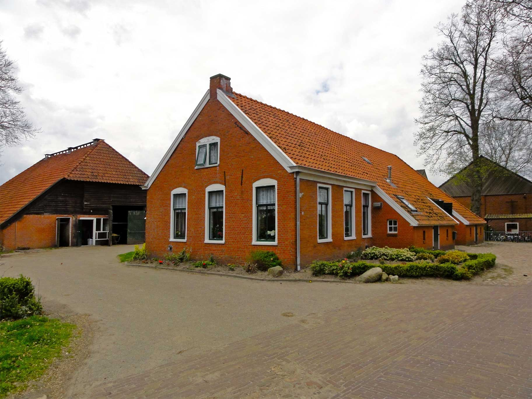 Boerderij Kerkbrink 4 te Anloo